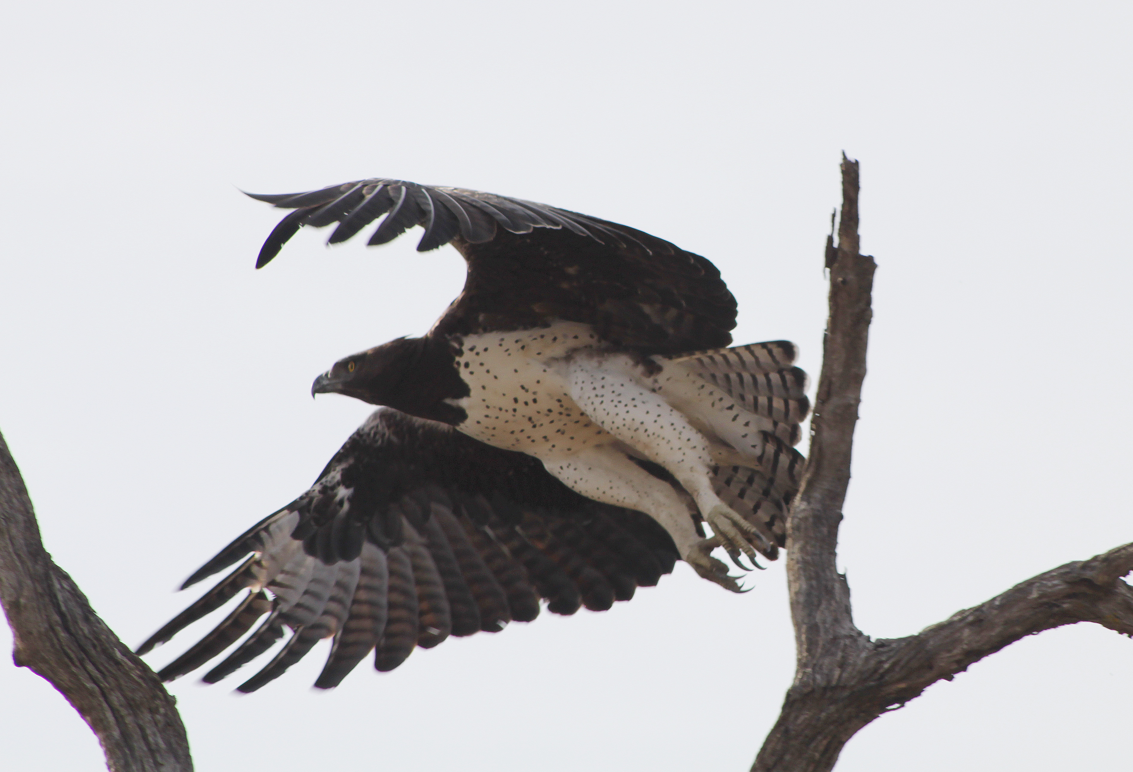 Martial eagle (Polemaetus bellicosus)